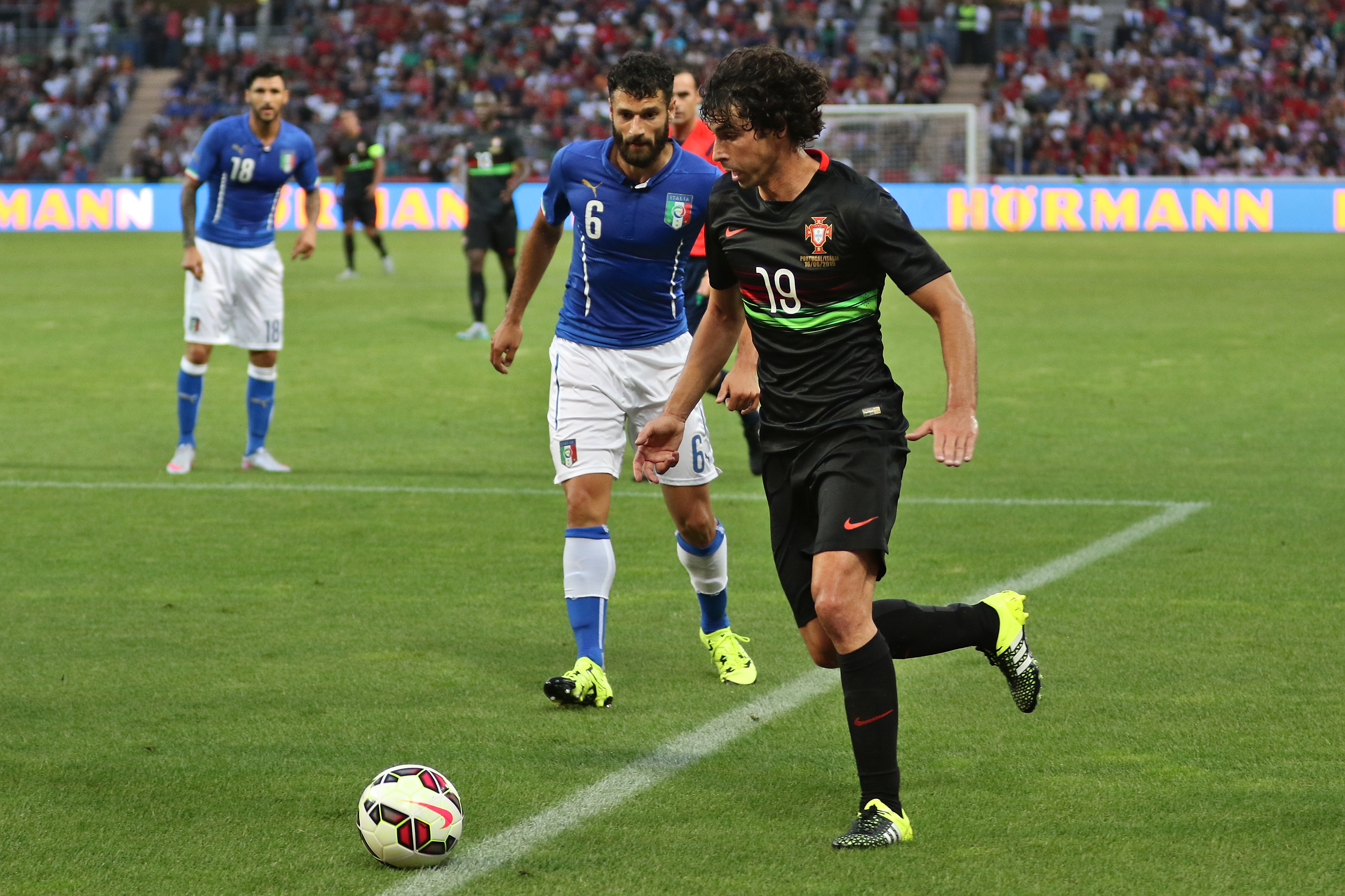 20150616 - Portugal - Italie - Genève - Tiago Mendes devant Antonio Candreva